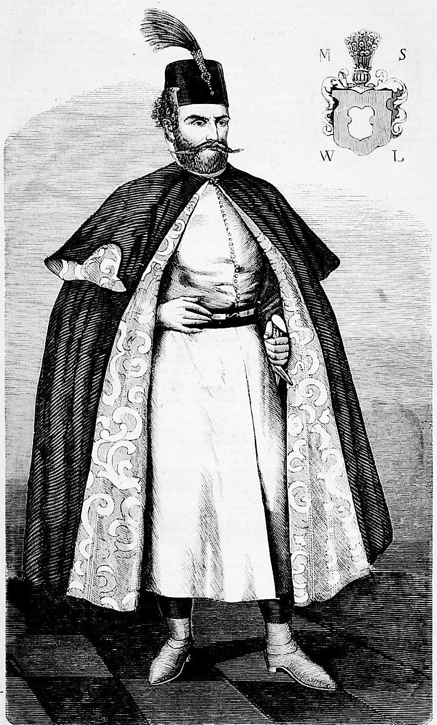 Marek Sobieski, 1550-1605